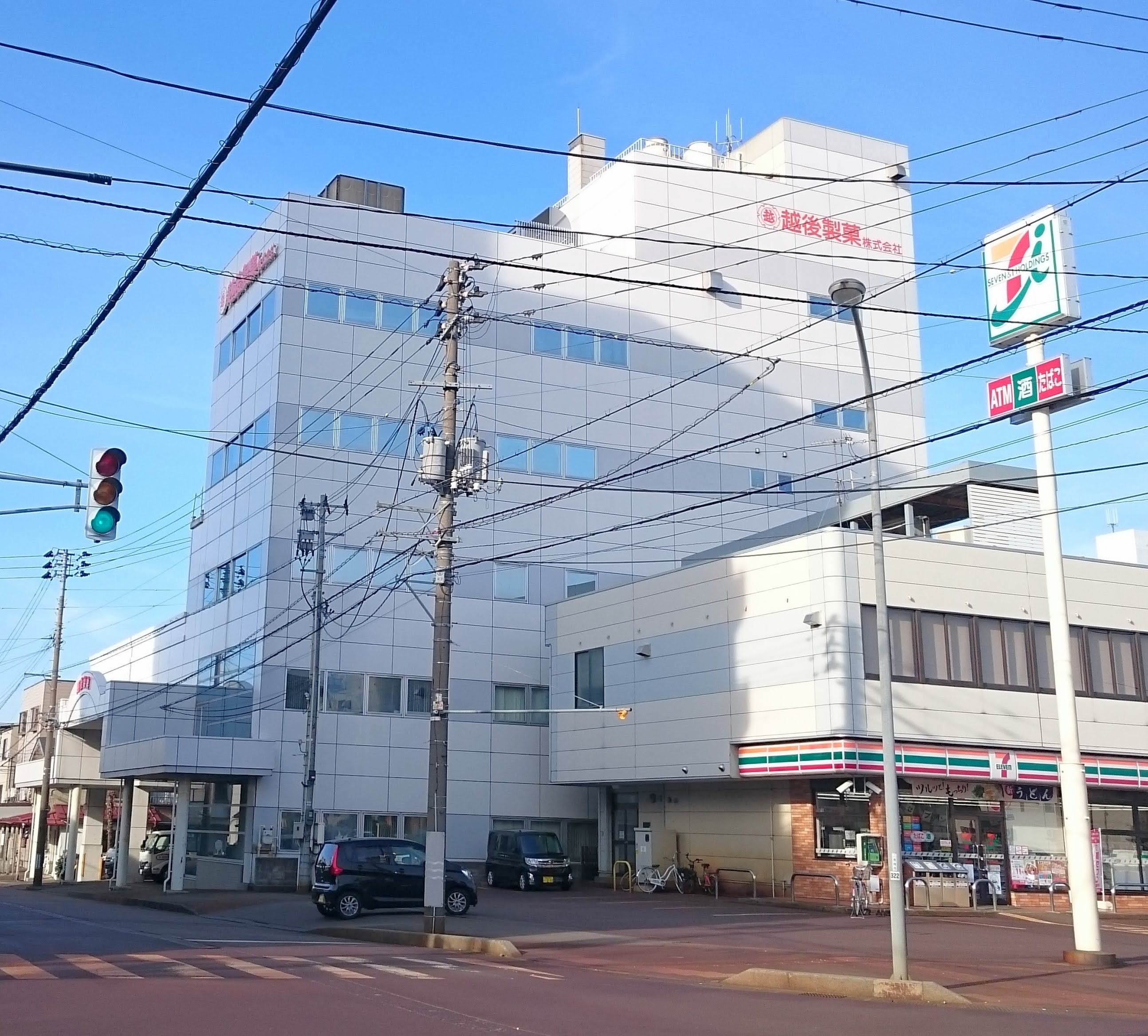 越後製菓の本社外観